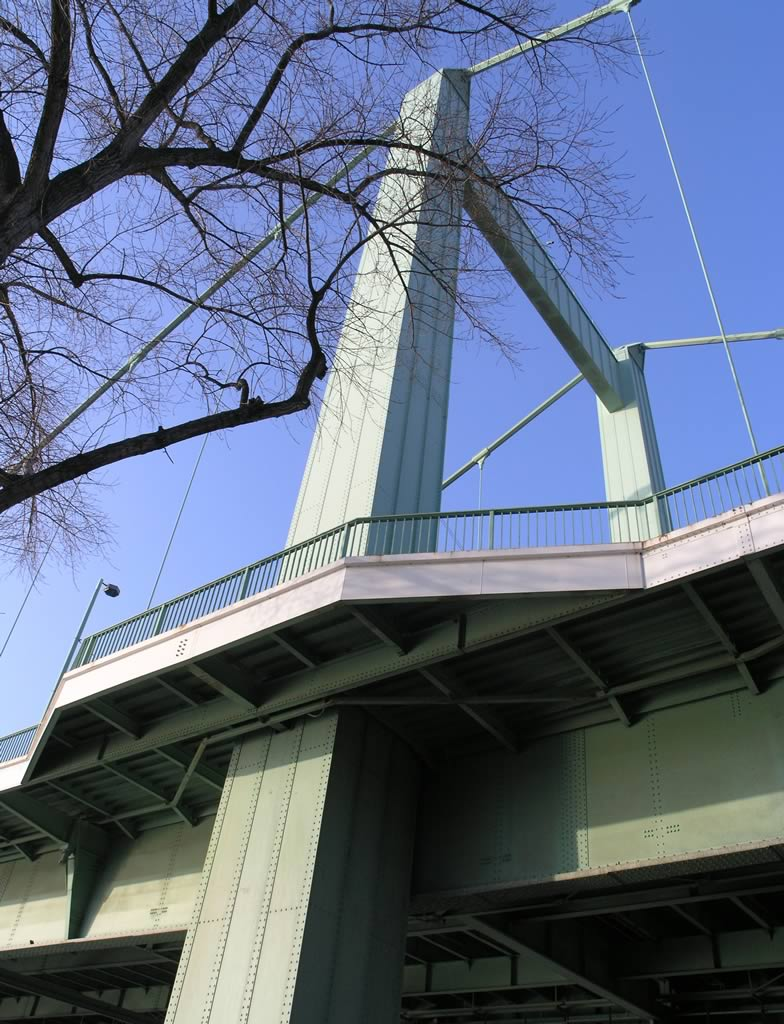 Typisch für die Nachkriegsversion der Mülheimer Brücke in Köln: der Fuß- und Radweg um die Pfeiler herumgeführt.